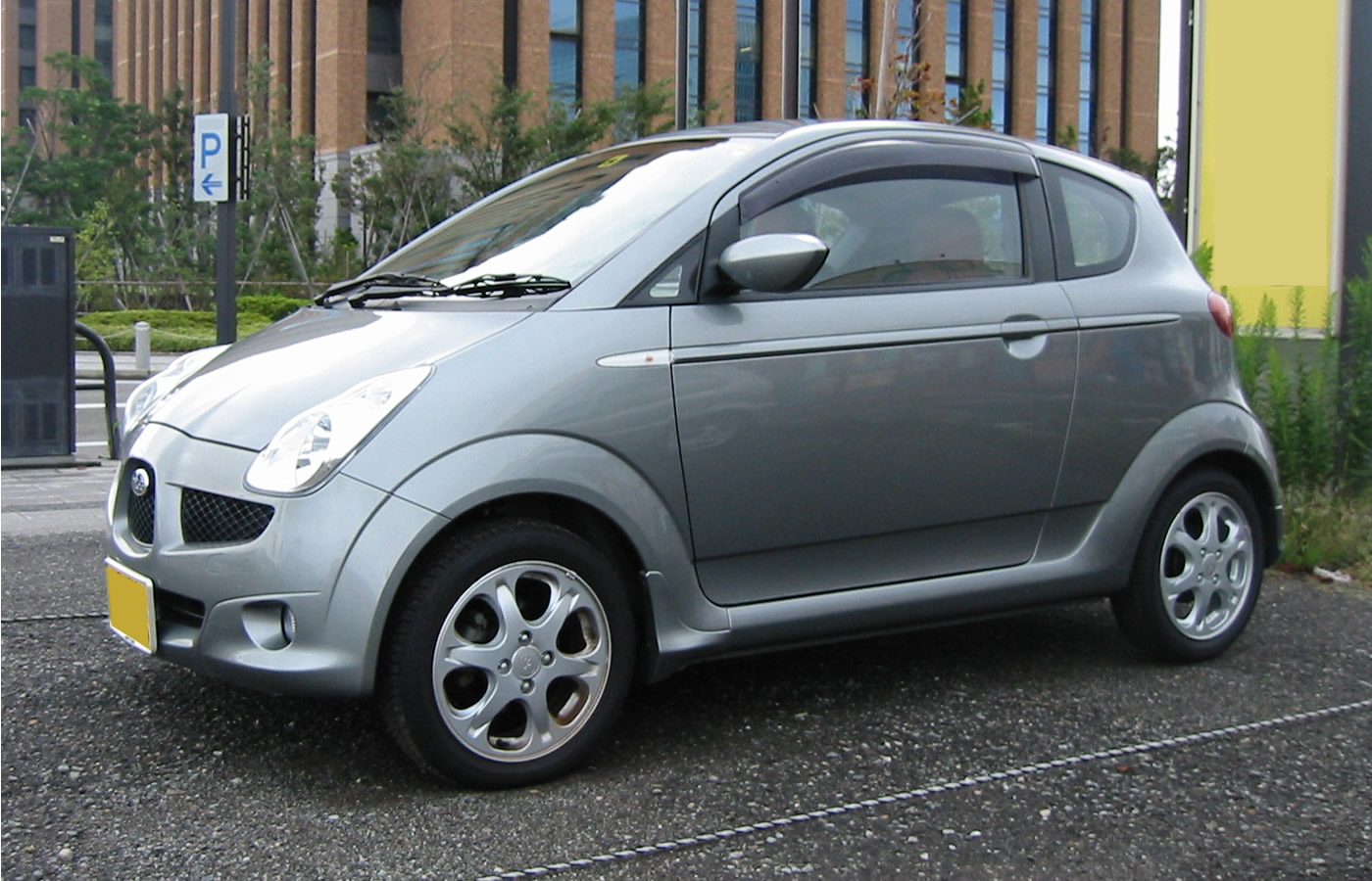 Subaru R1 (スバル・R1), a Keicar manufactured by Subaru